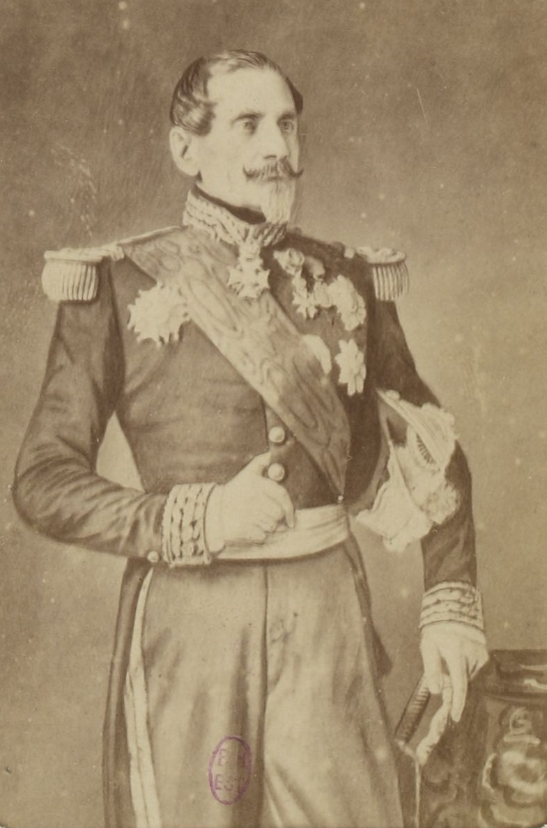 Le général Leroy de Saint-Arnaud, photographie de Pierson.